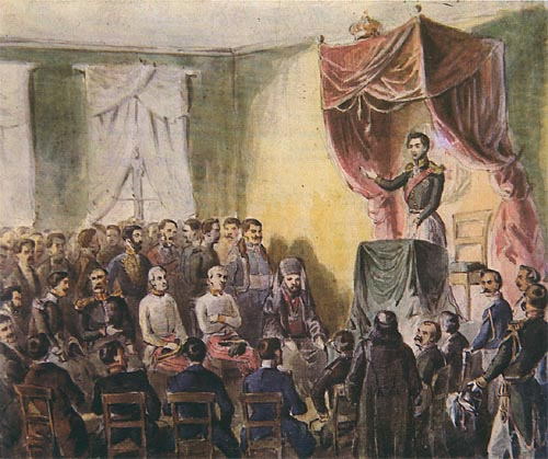 Анастас Јовановић: Кнез Михаило говори члановима ДСС на првој седници 8. јуна 1842. године